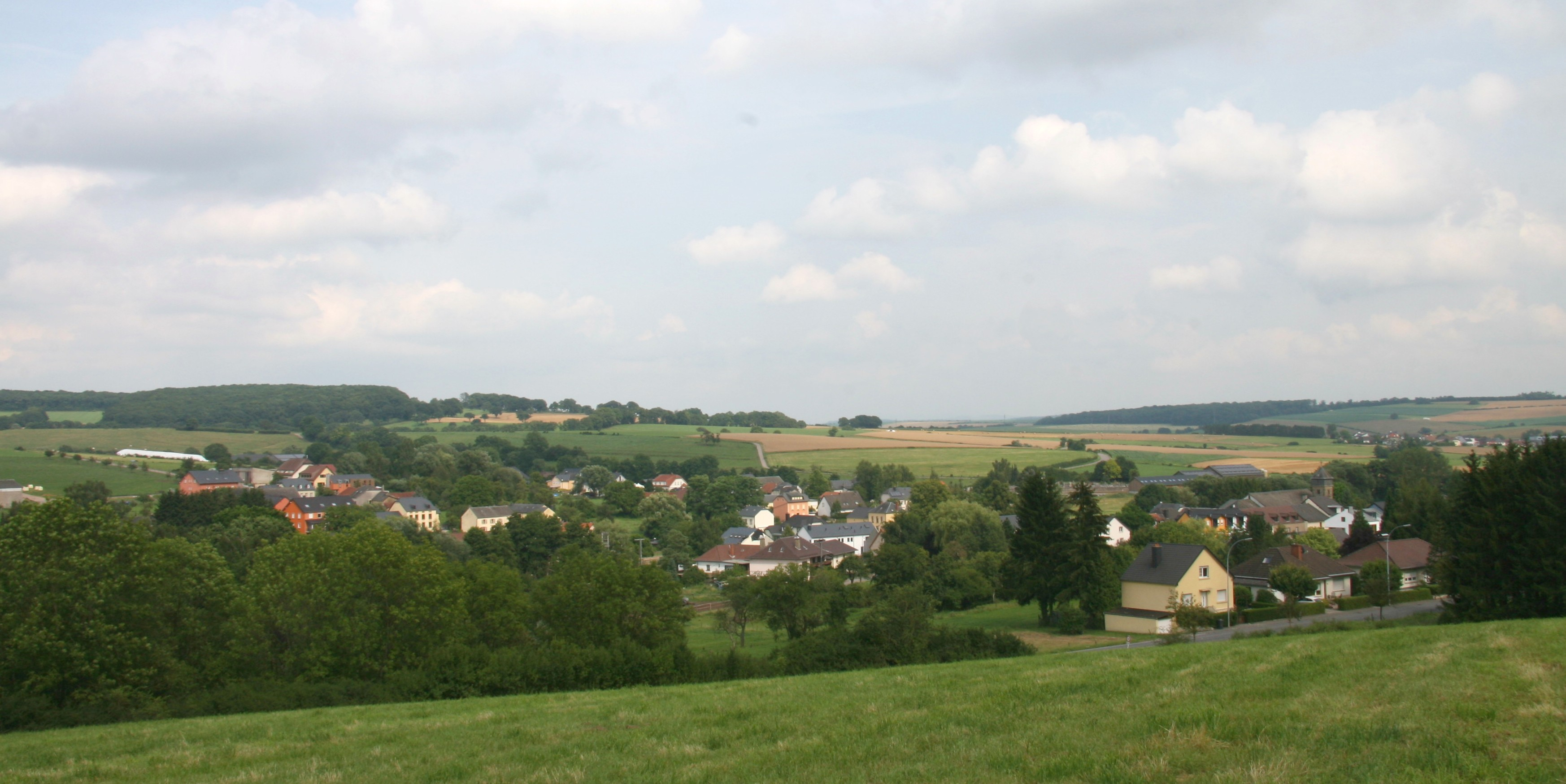 Vue op Biwer - user Ioni